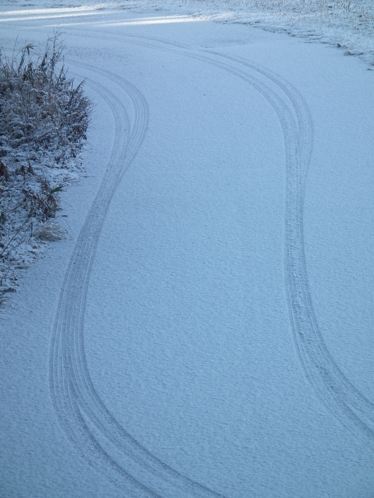 Snow in Sasayama,Hyogo,Japan 2012 篠山市の冠雪 - 轍